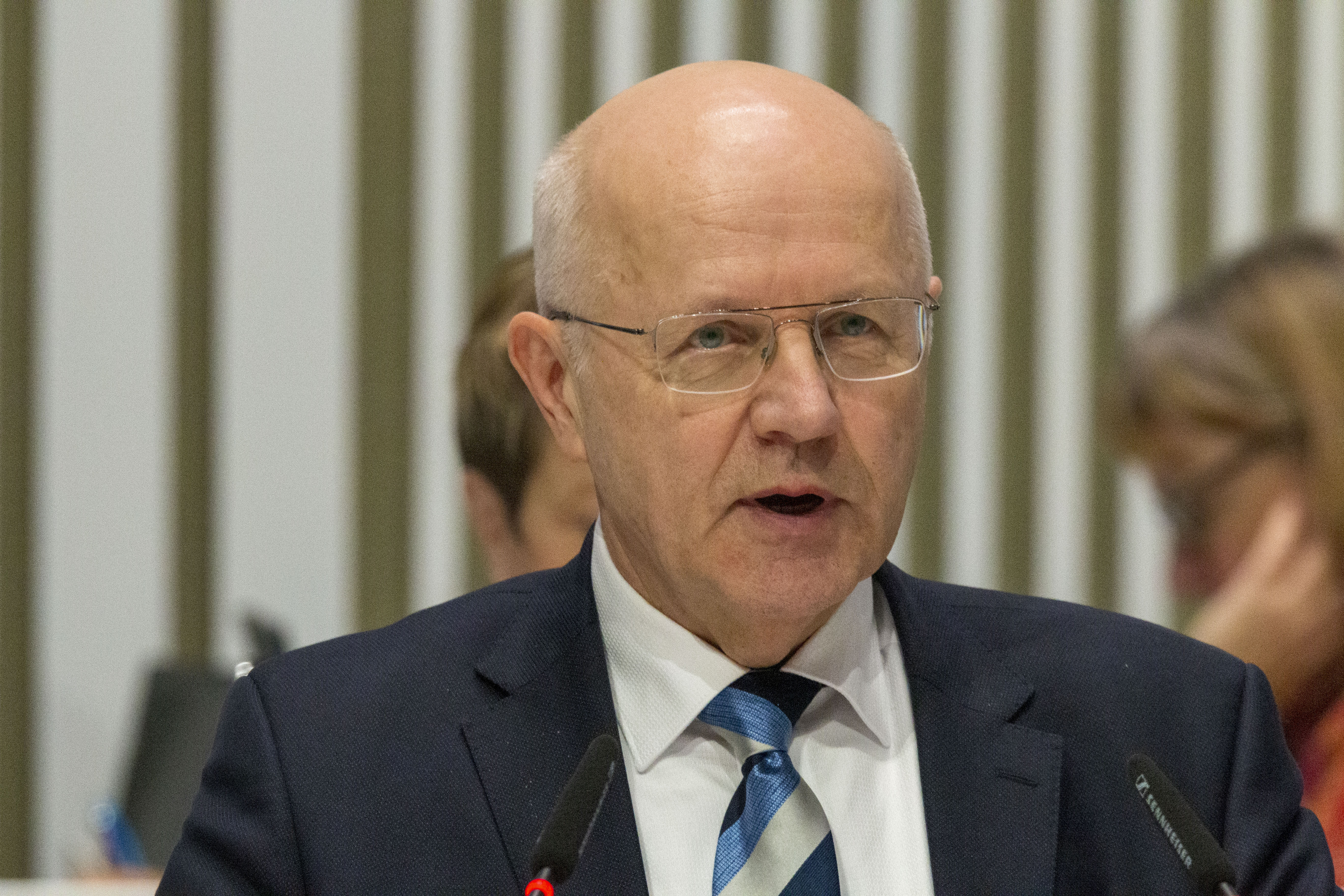 Abgeordnete des Landtages Mecklenburg-Vorpommern während einer Plenarsitzung Ende Januar 2020 in Schwerin.